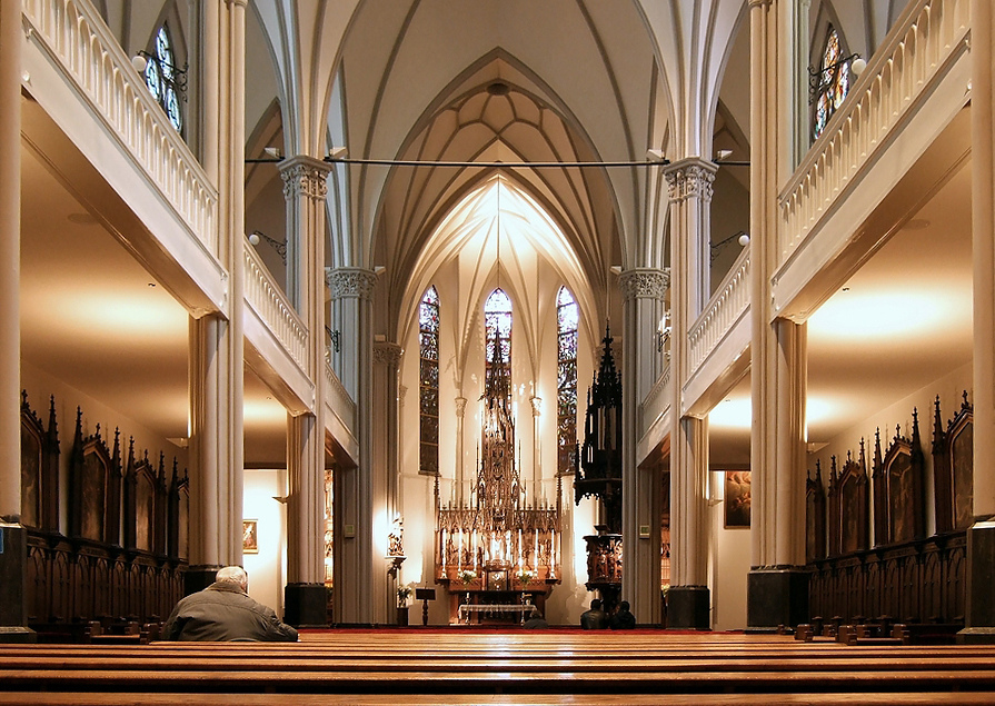 46 kerk de papagaai